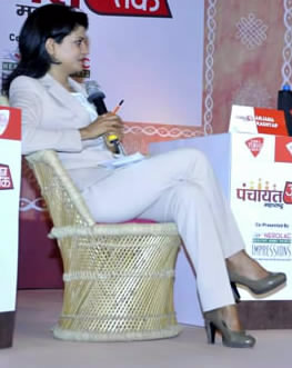 Anjana Om Kashyap at 'Panchayat Aaj Tak' talk show